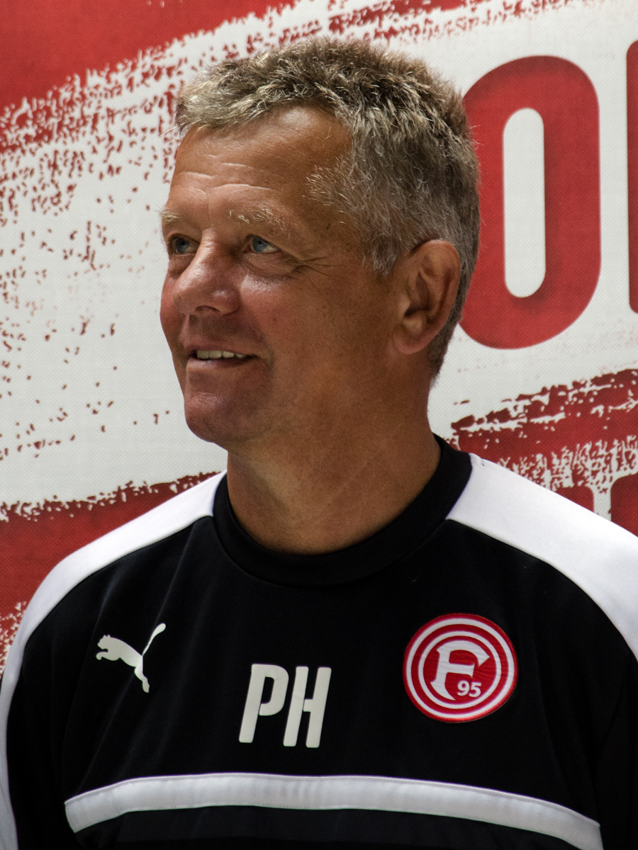 Peter Hermann, deutscher Fußballtrainer und ehemaliger -spieler (2016)